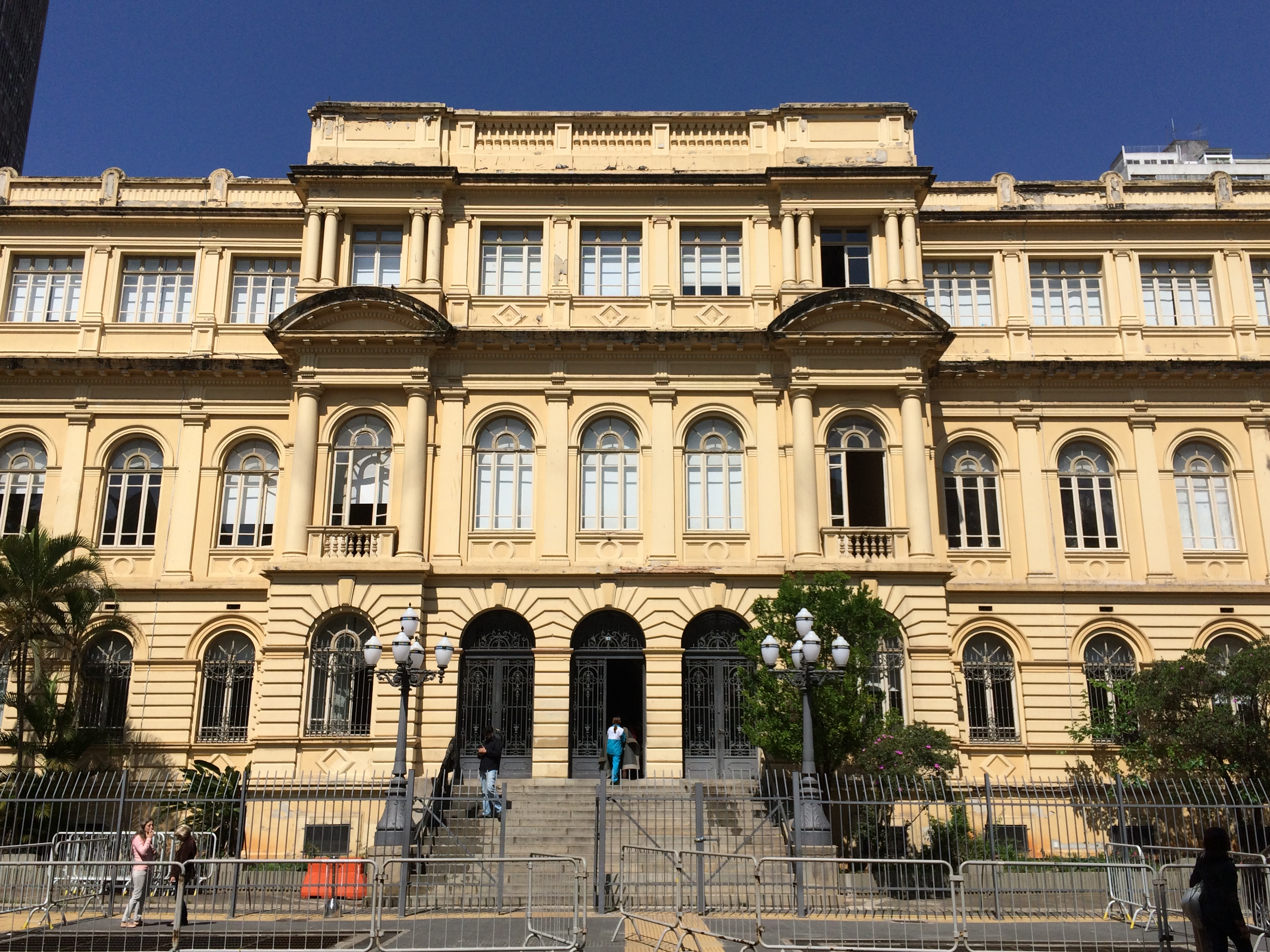 Entrada principal do prédio da Casa Caetano de Campos, em São Paulo (SP)